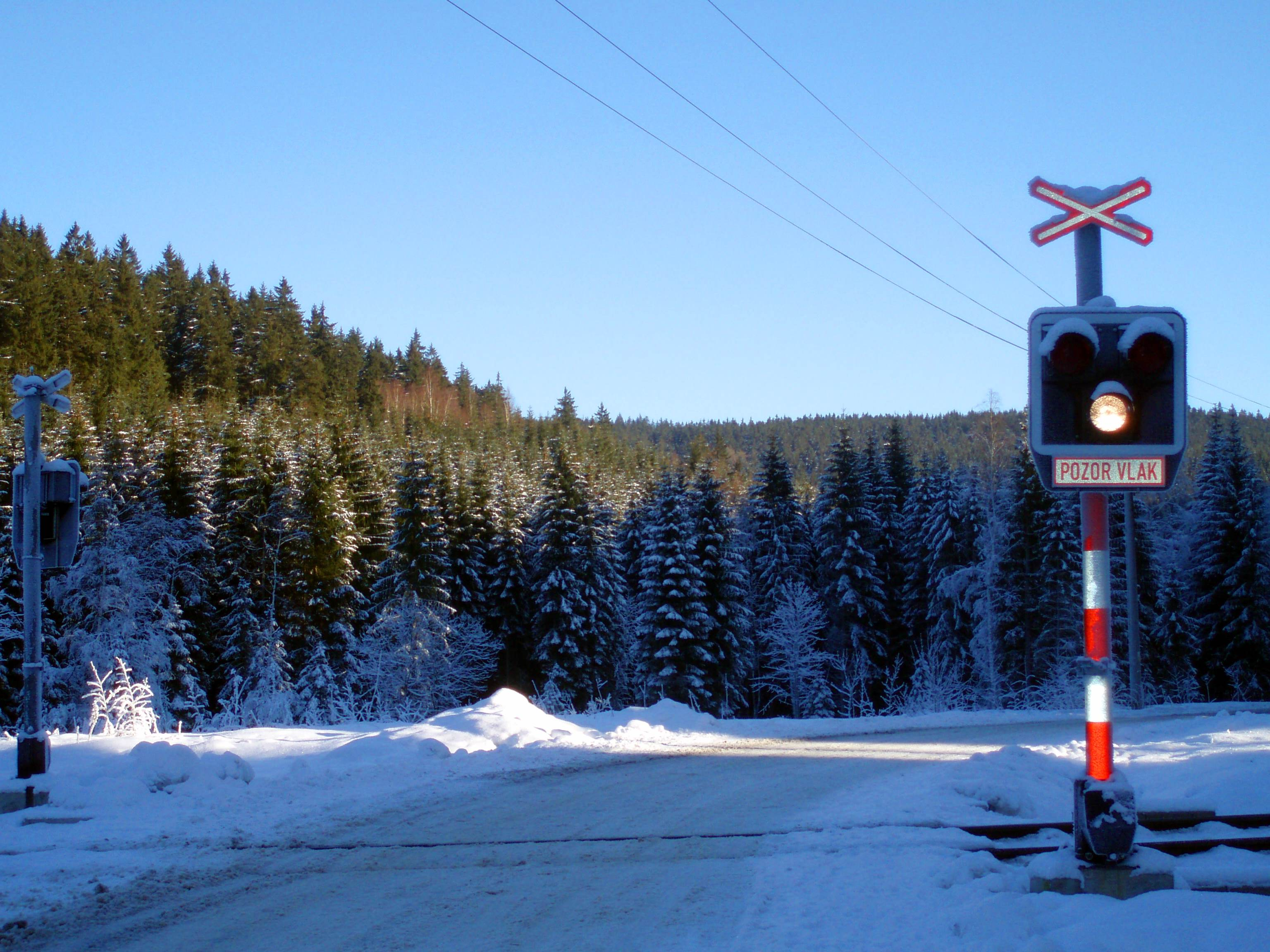 Bahnübergang in Potůčky